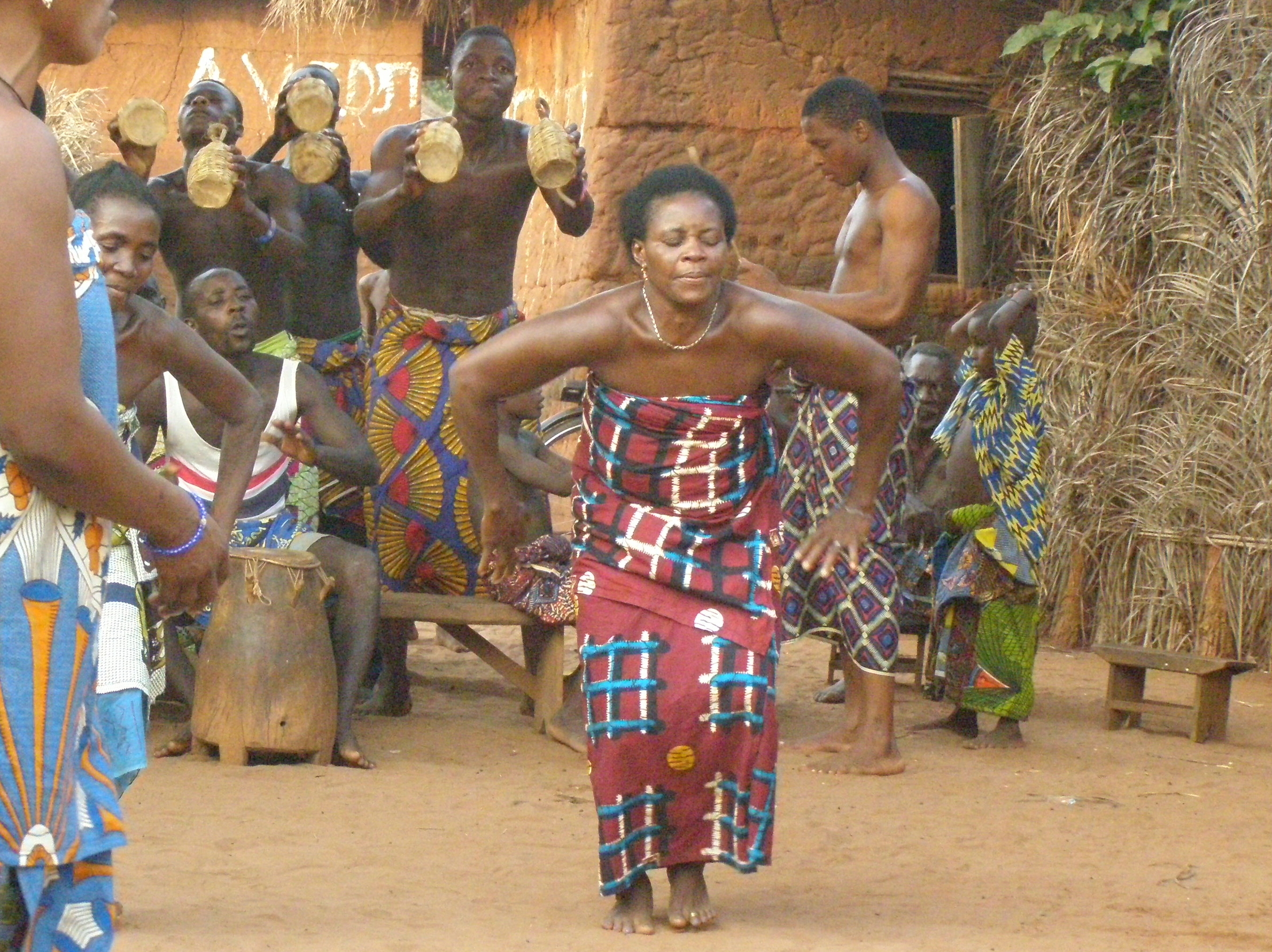 Village of Attitogon, Maritime Region, Togo